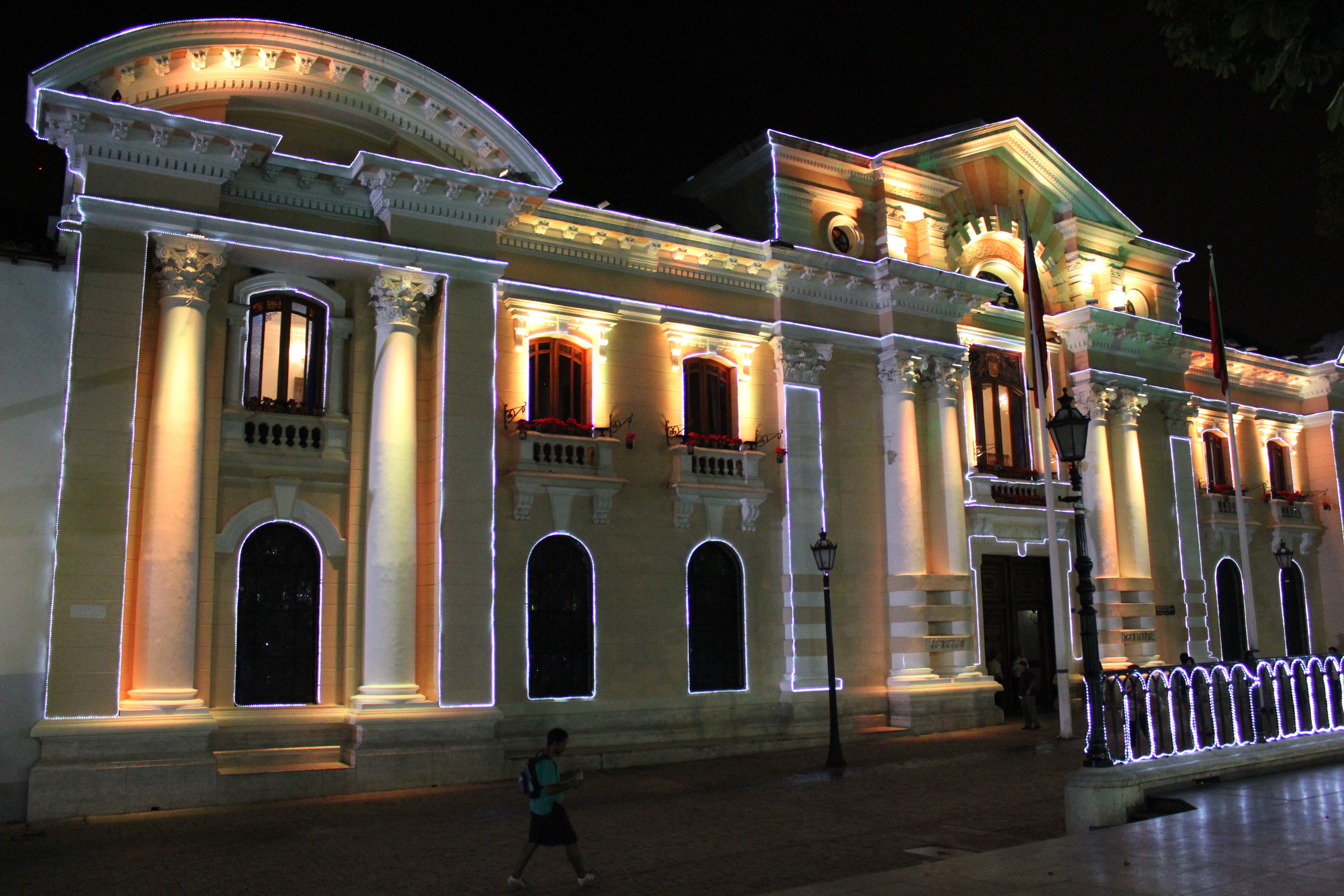 Consejo Municipal frente a la Plaza Bolívar. Centro de Caracas. Venezuela